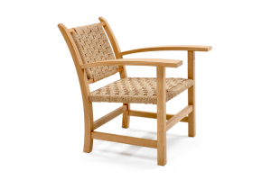 Butaca Josep Torres Clave. Museu del Disseny de Catalunya